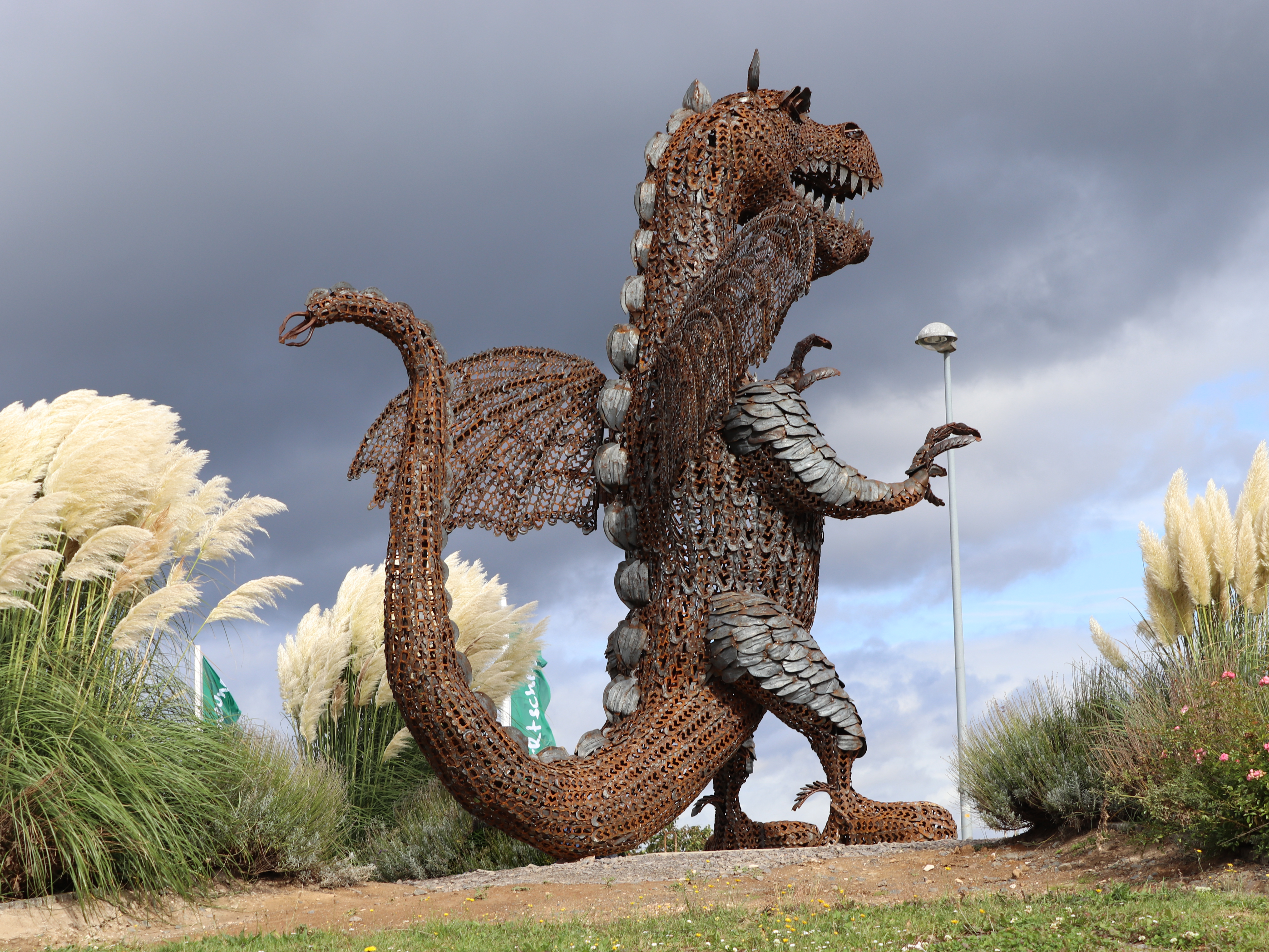 Die eiserne Skulptur "Wachtberger Drache" ist im Rahmen eines Schulprojektes entstanden, das der Förderverein für Kunst und Kultur in Wachtberg e. V. (KuKiWa) anlässlich des 50-jährigen Bestehens der Gemeinde Wachtberg ins Leben gerufen hat.